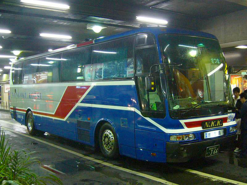 登録番号 鹿児島200か・366 南国交通所属 さつま号・桜島号で共通運用 2007年3月24日 阪急三番街にて撮影